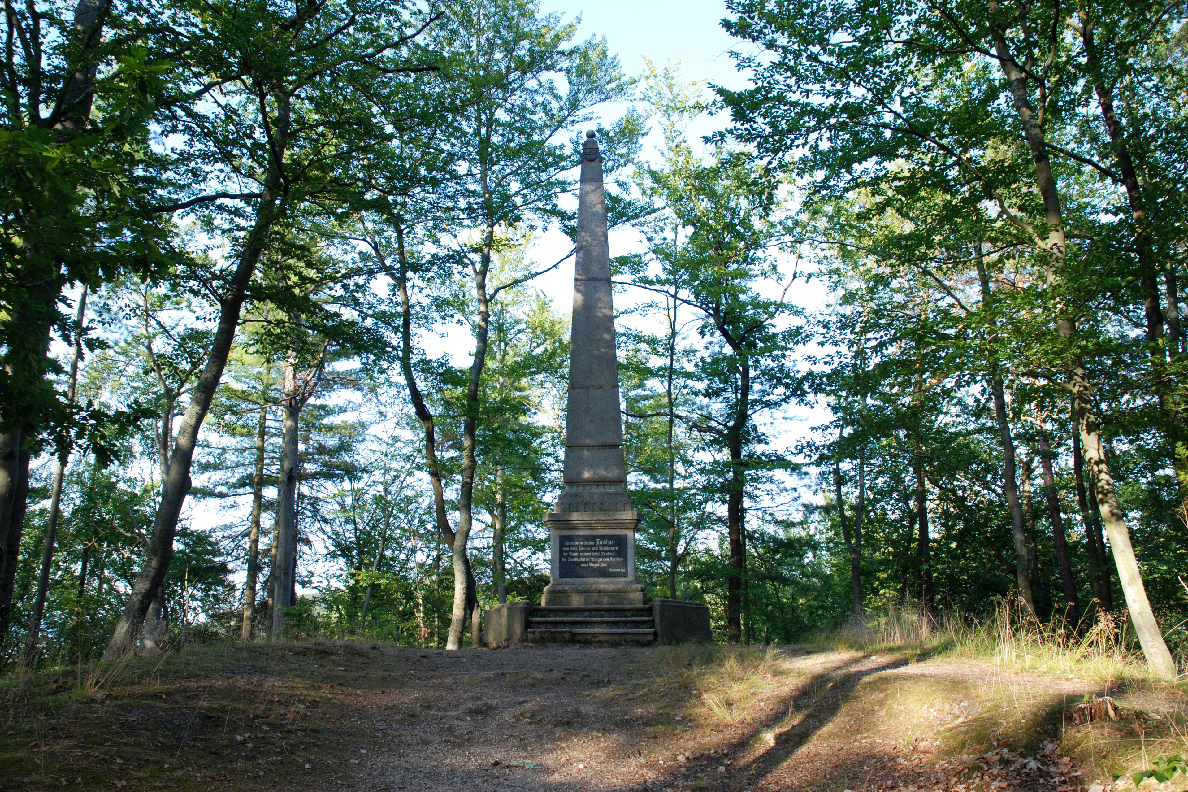 Findlaterův obelisk v karlovarských lázeňských lesích